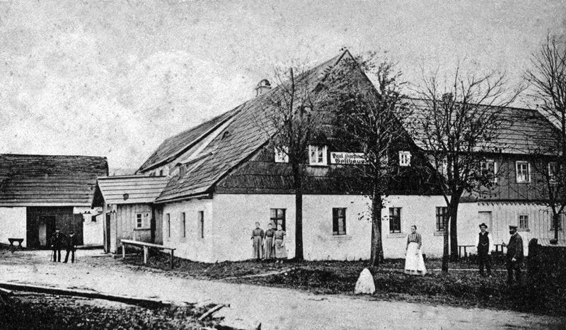 Gasthof Paul Hartmann, Vorläufer der Brandbaude